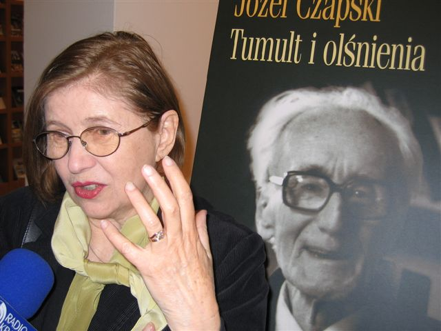 Krystyna Zachwatowicz-Wajda (b. 1930), Polish stage designer and actor